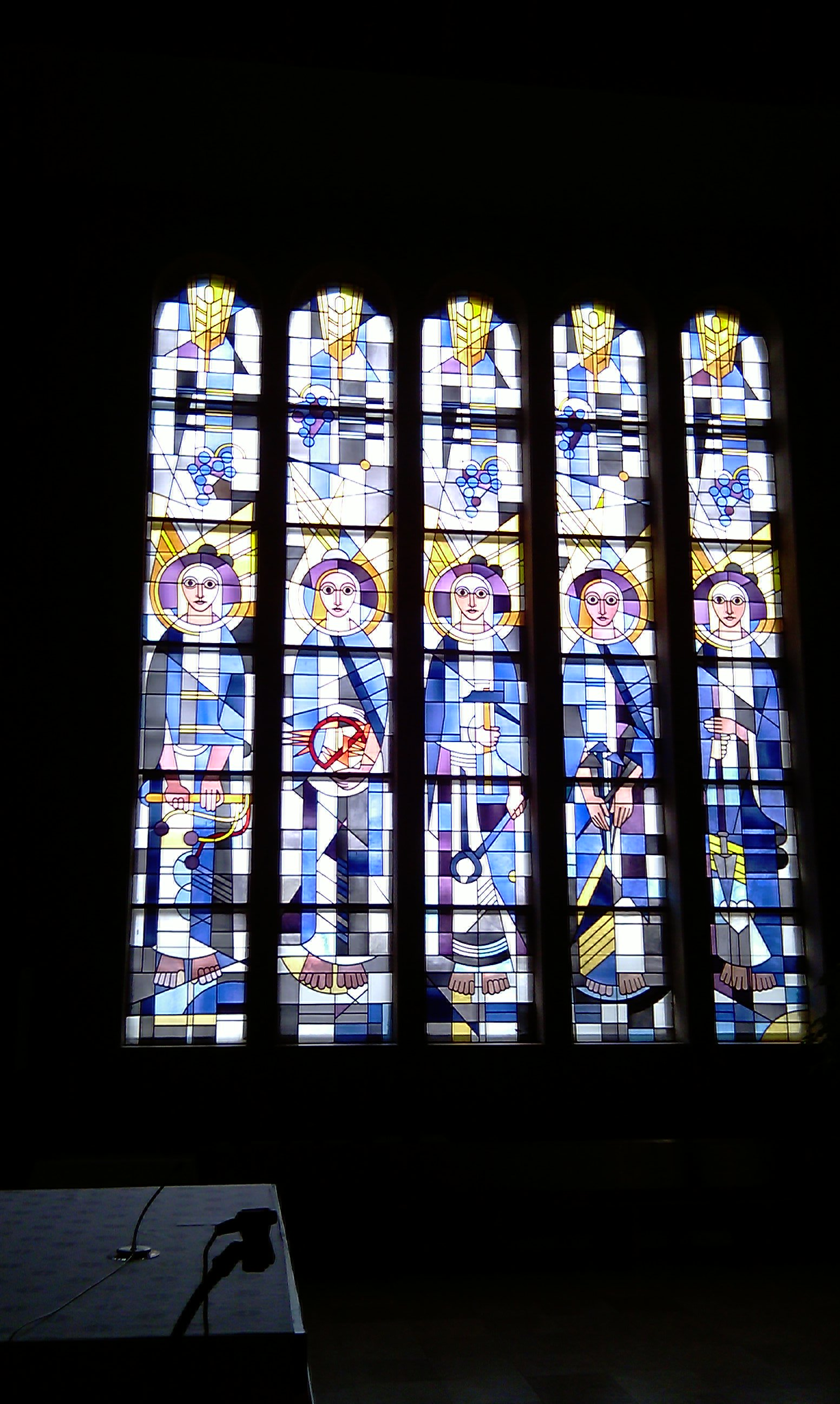 Fenster in der Apsis der Kirche Maria Königin (Lüdenscheid.